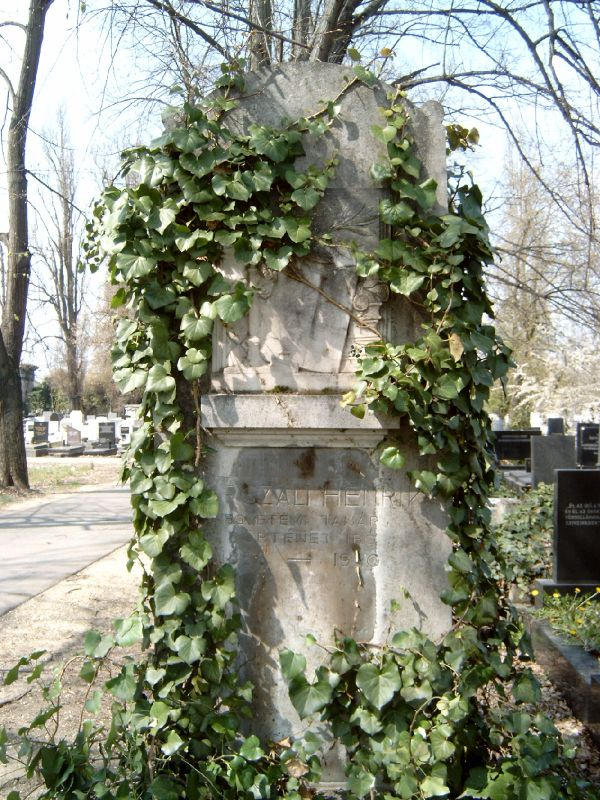 Marczali Henrik (Marcali, 1856. ápr. 3. – Bp., 1940. júl. 21.): történetíró, egyetemi tanár sírja Budapesten. Kozma utcai izraelita temető: 5B-10-1.